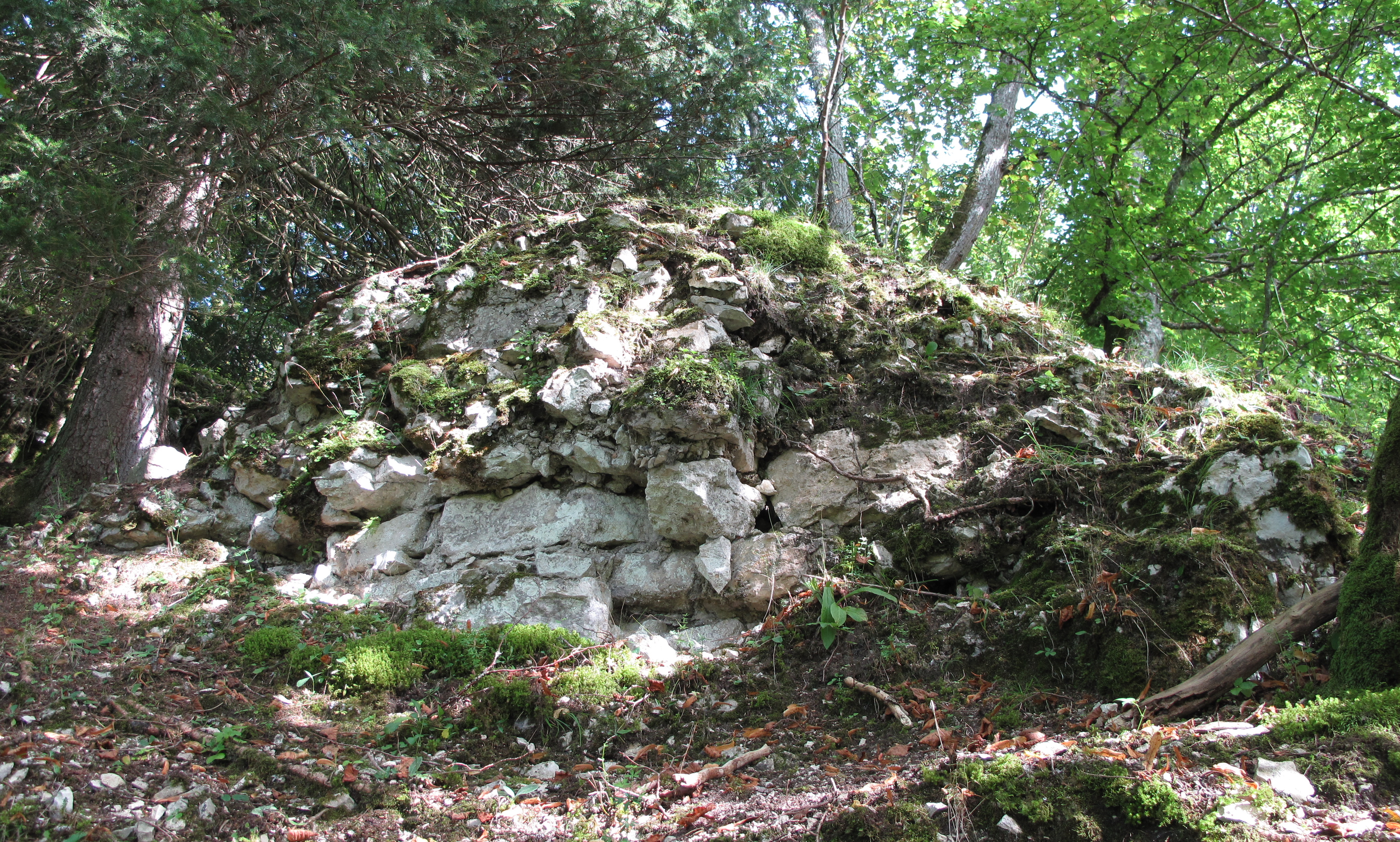 Derselbe Mauerrest an der Westecke der Kernburg.